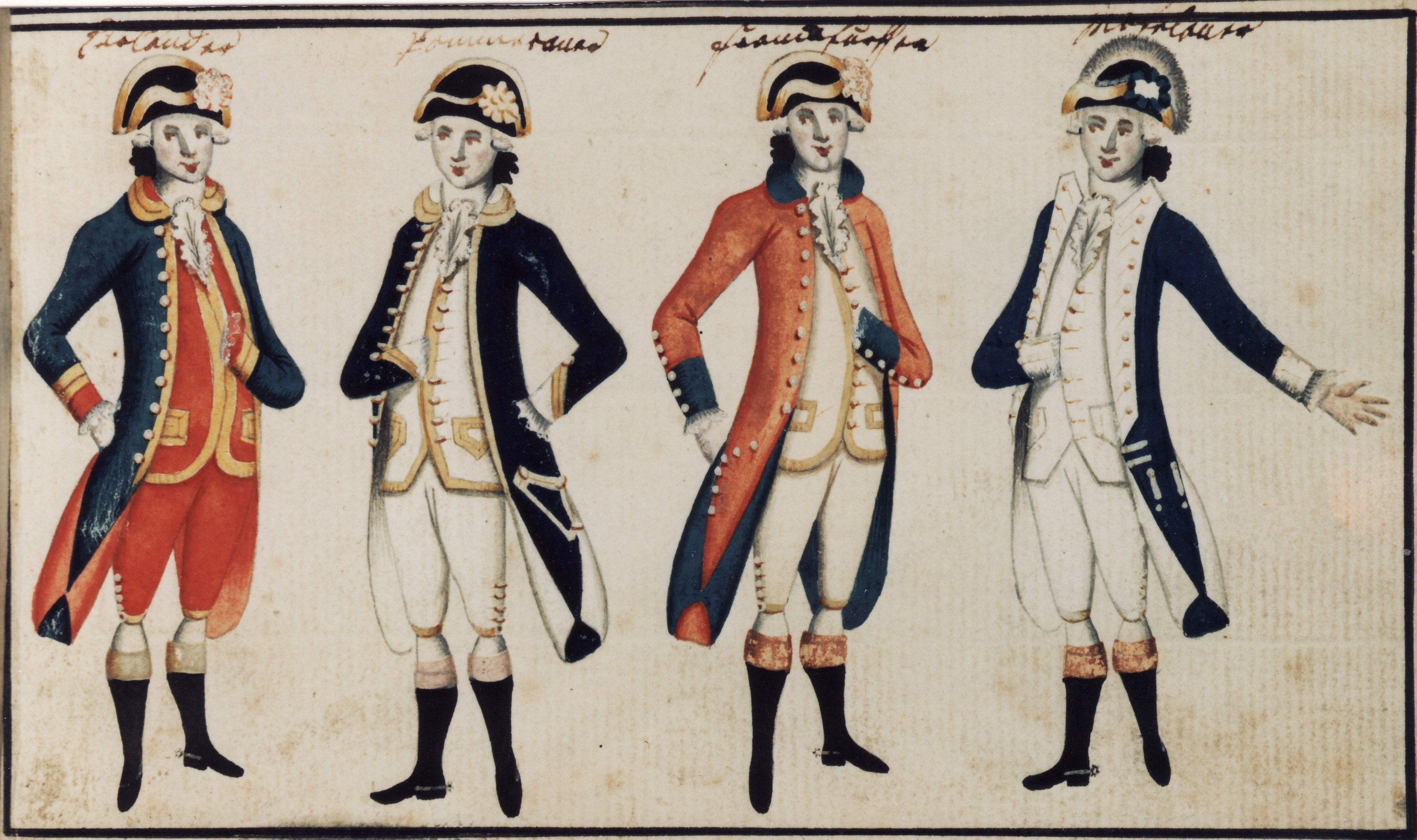 Vier Göttinger Landsmannschafter auf einem Blatt des Stammbuches Rupstein (Von links nach rechts: ein Kurländer, ein Pommeraner, ein Frankfurter und ein Moselaner).